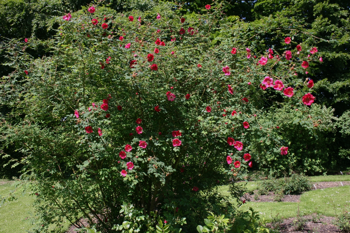 Rosa moyesii: Habit.